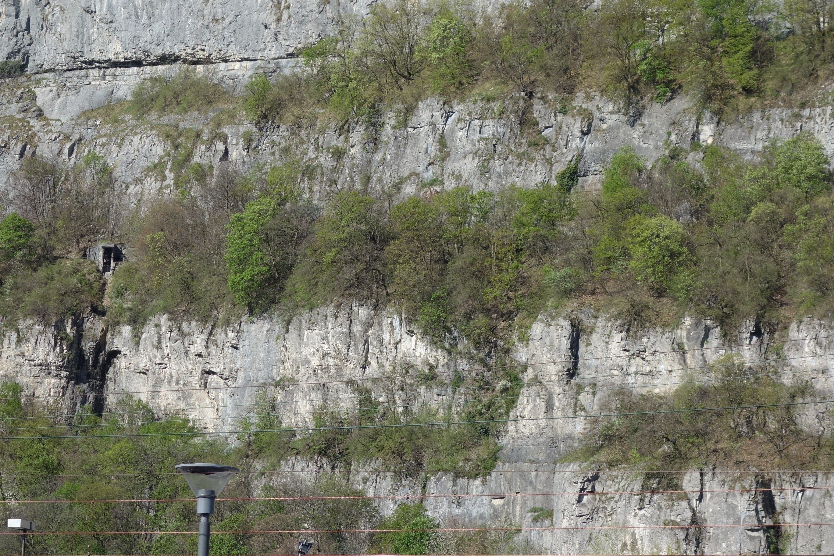 Fort du Scex, Saint-Maurice VS, Schweiz